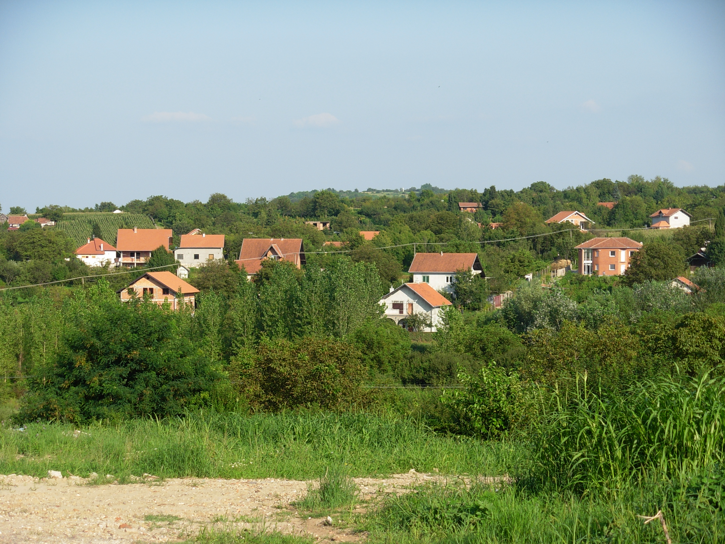 Naselje Alibegovac, Petrovaradin.